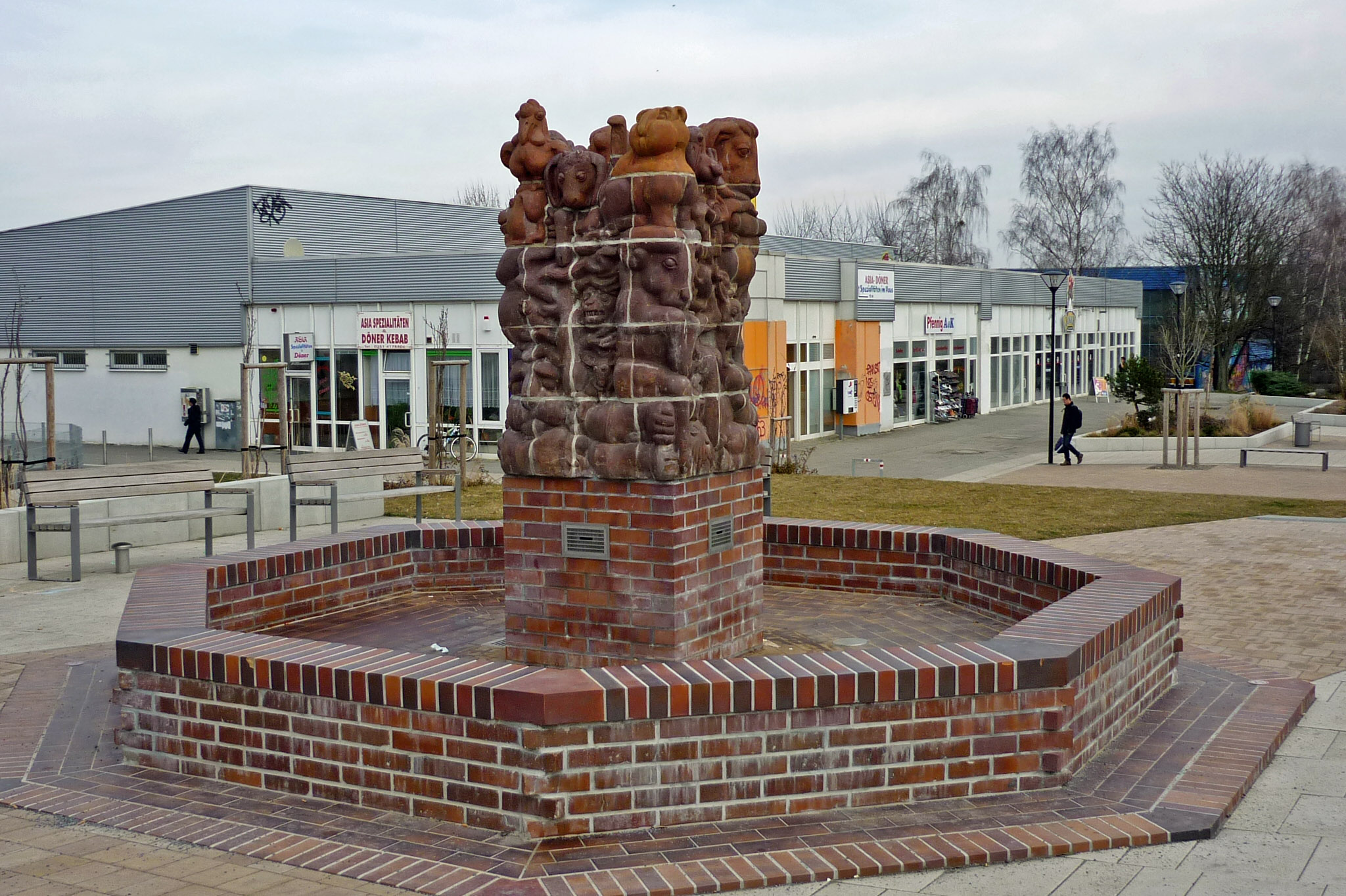 Gorbitzer Märchenbrunnen (Keramik) an der Höhenpromenade in Dresden-Gorbitz (von Karl Schönherr, durch Egmar Ponndorf und Dieter Graupner, 1987)